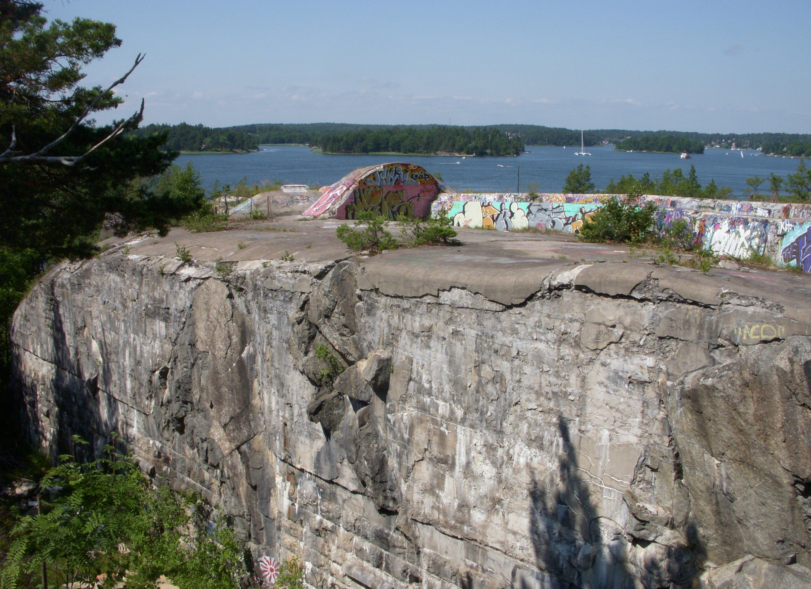 12:e batteriet på Rindö, tillhör Rindö redutt